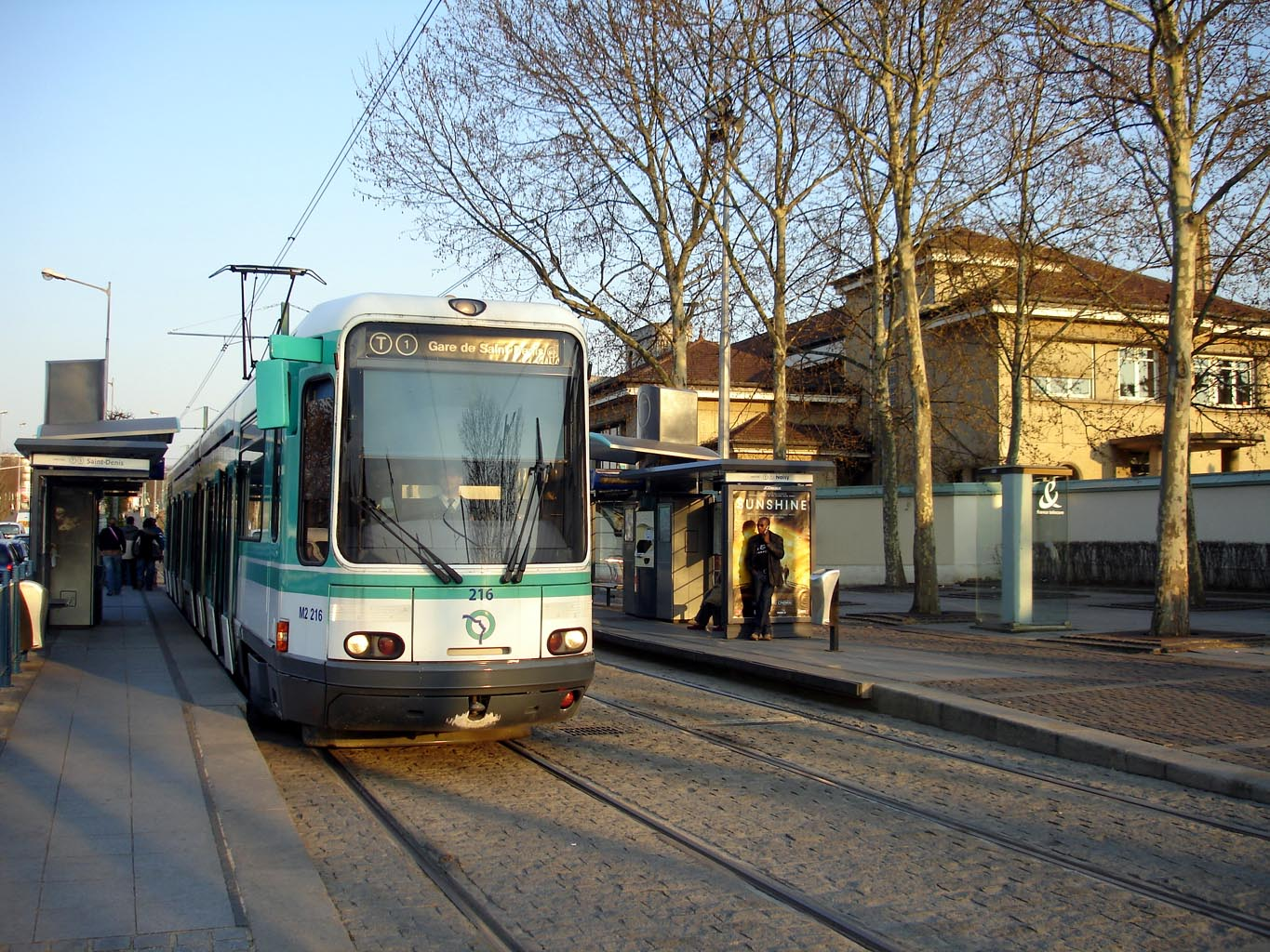 Station de la ligne 1 du tramway parisien Hôpital Avicenne à Bobigny (Seine-Saint-Denis), France